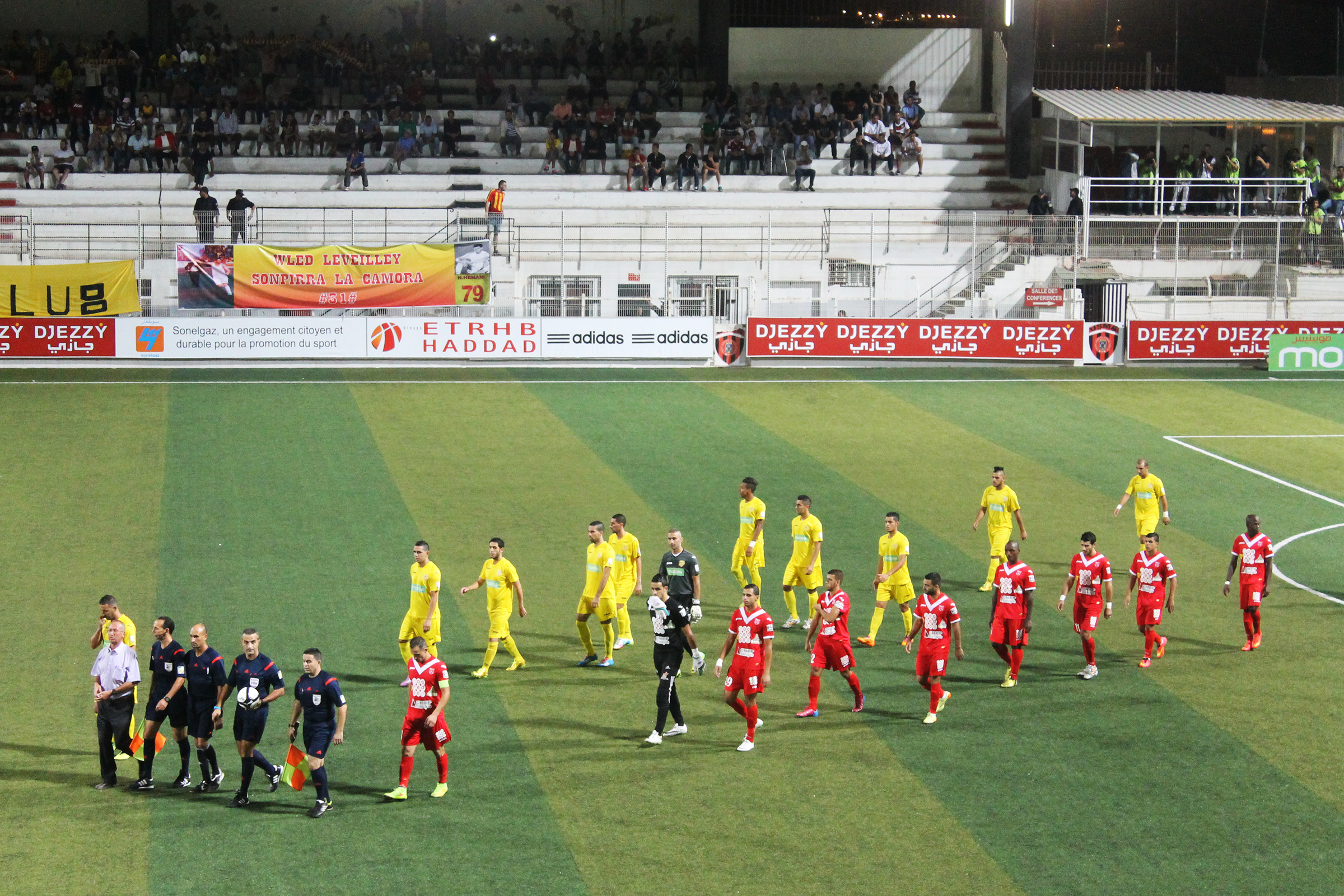 Entrée des joueurs des deux équipes sur le terrain du stade Omar-Hamadi.